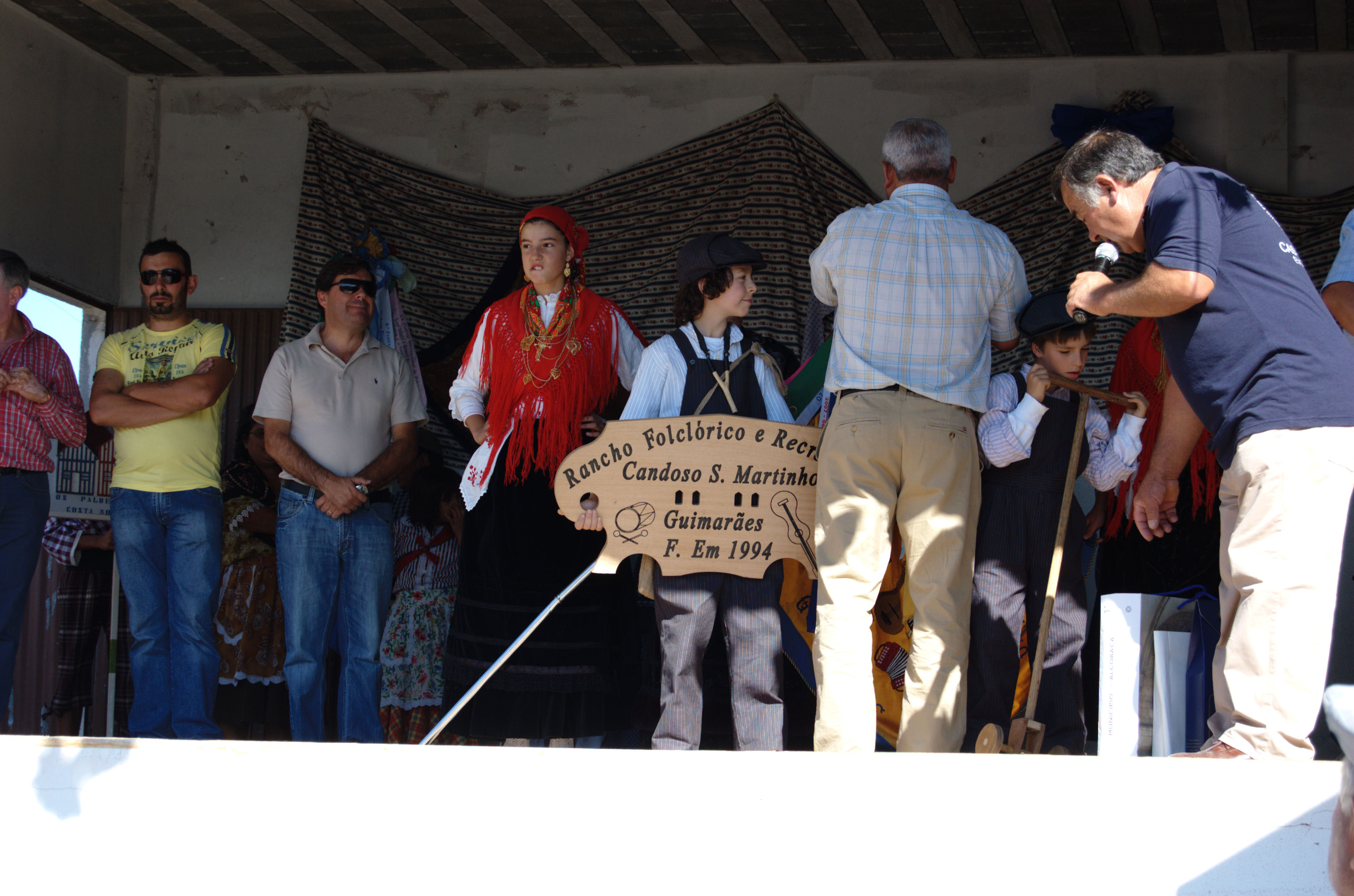 Festa Verão 2008